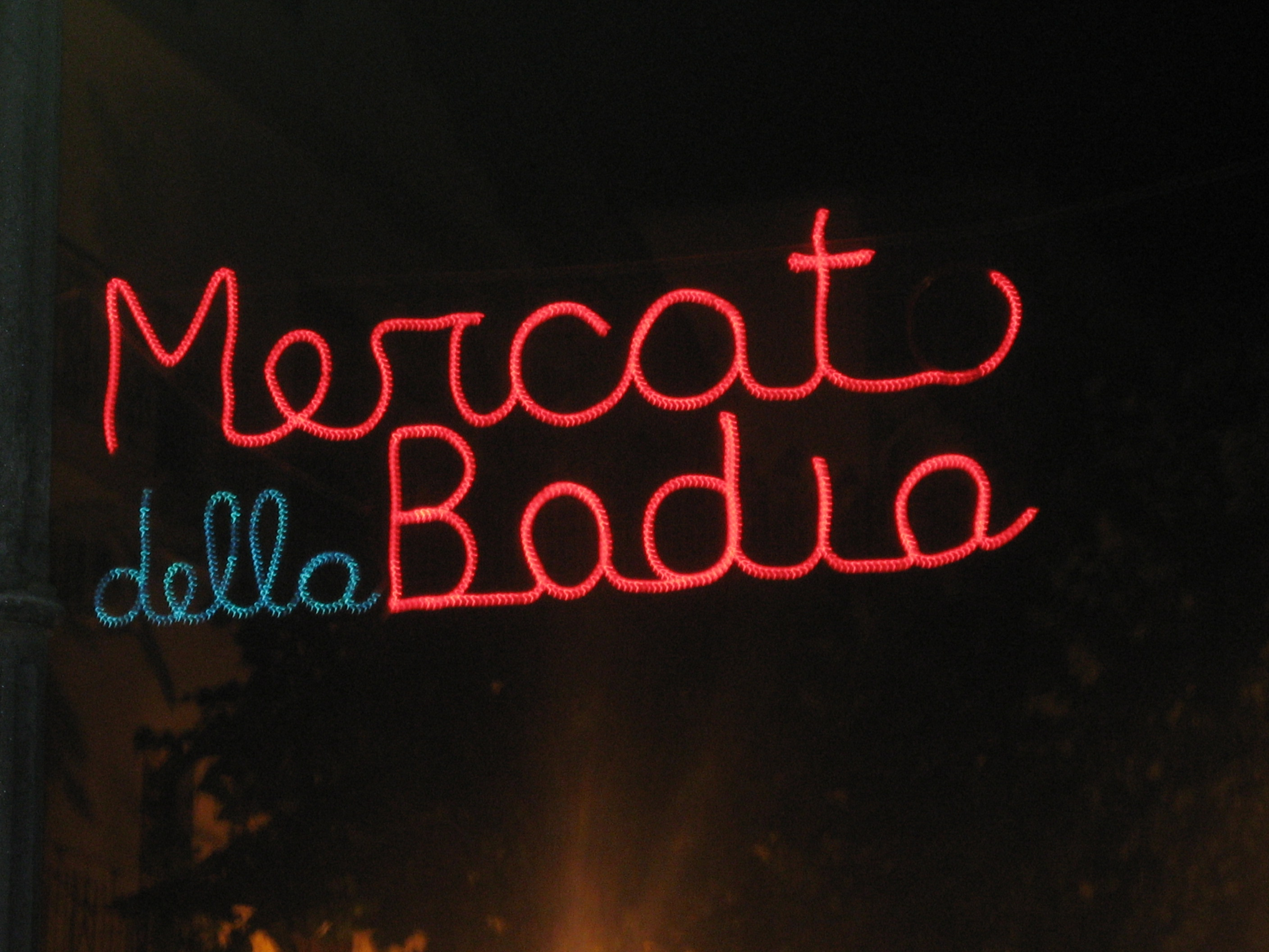 Mercato_della_badia insegna